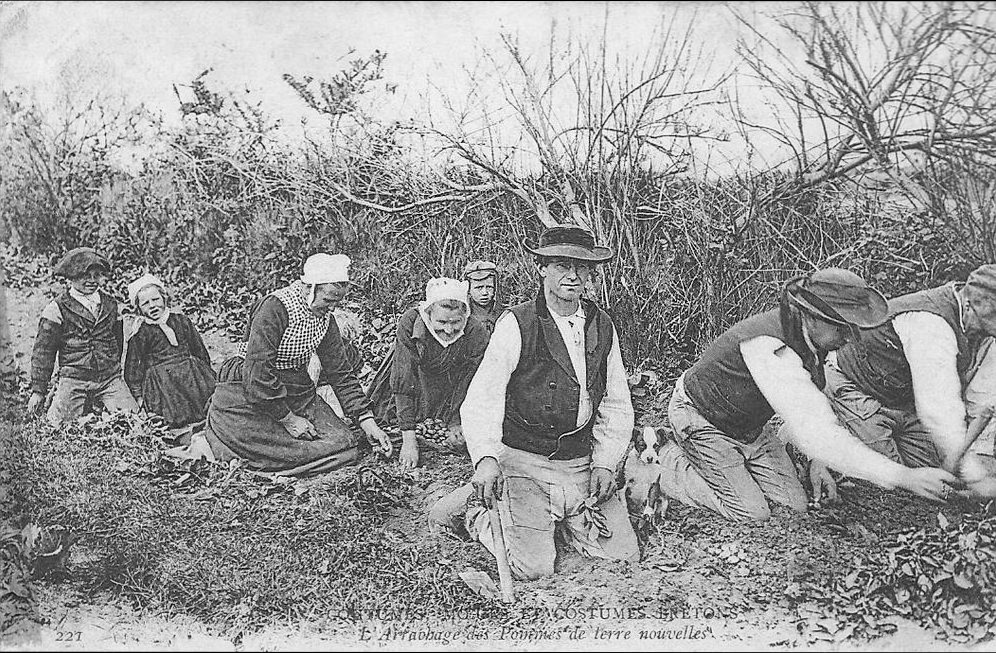 Bréhat : l'arrachage des pommes de terre nouvelles (carte postale, auteir inconnu, vers 1920)